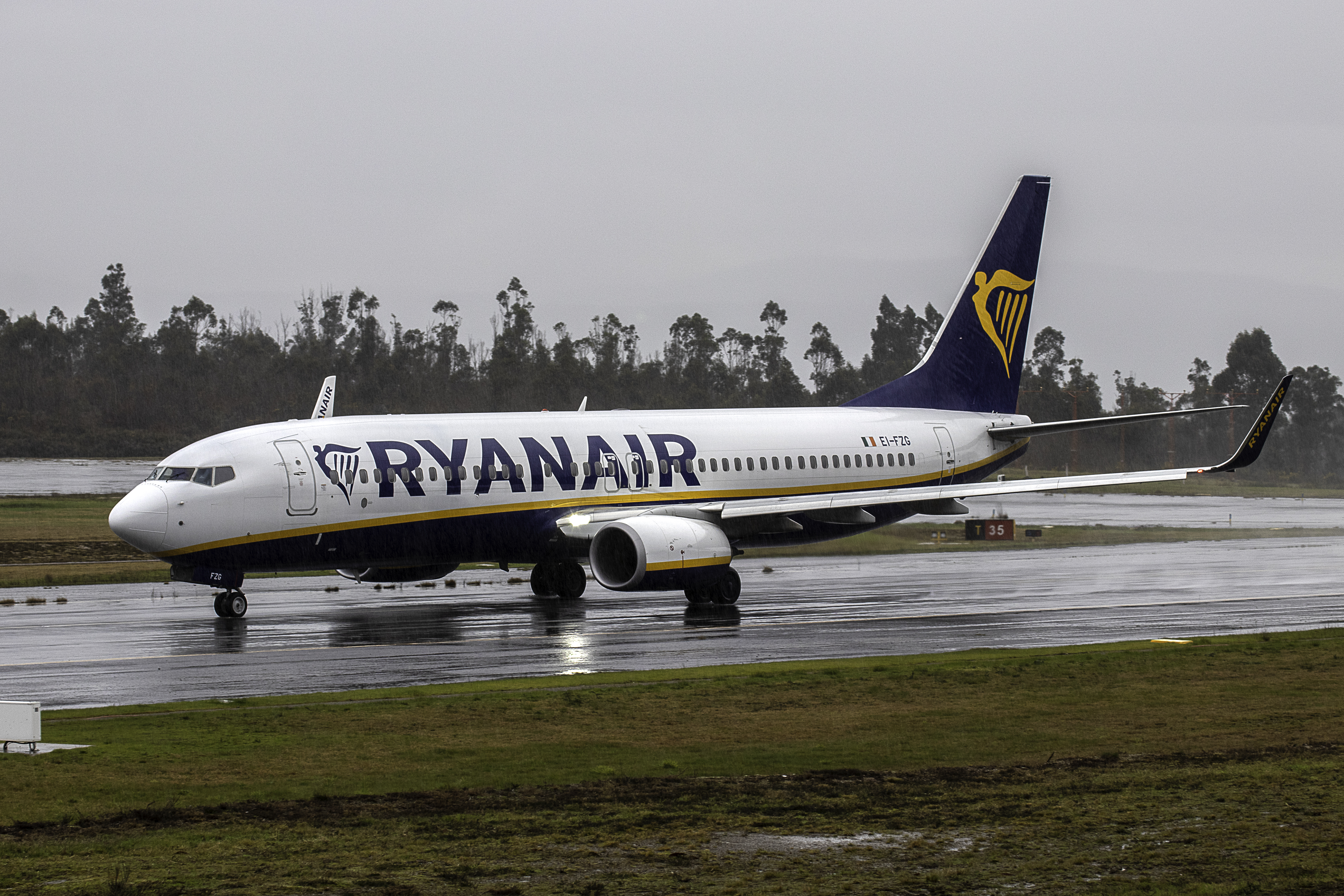 Boeing 737 de Ryanair rodando tras aterrar no aeroporto de Santiago de Compostela.